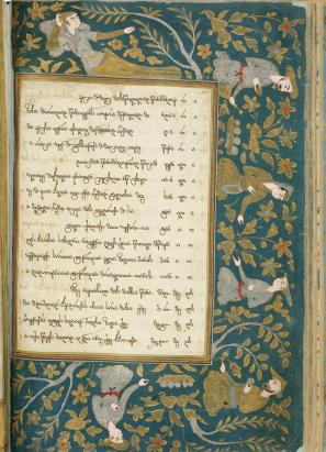 ერთ-ერთი გვერდი ავალიშვილისეული ვეფხისტყაოსნიდან